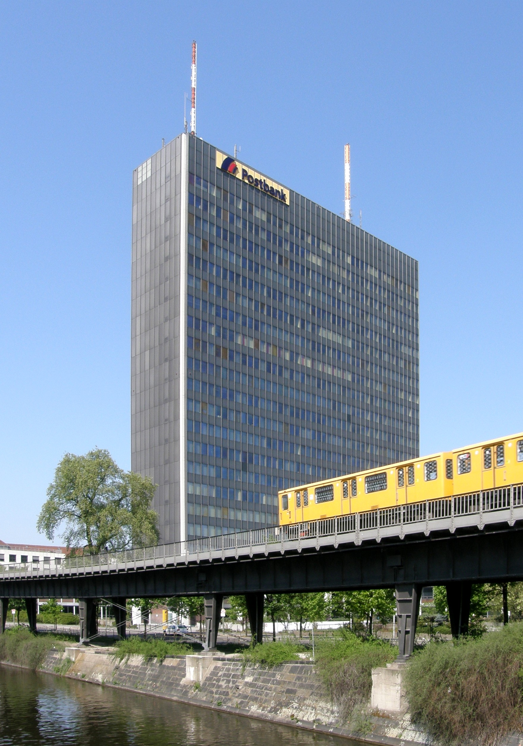 Postbank-Hochhaus (ehemals Postscheckamt Berlin (West)), Hallesches Ufer 60 in Berlin-Kreuzberg. Architekt: Prosper Lemoine.